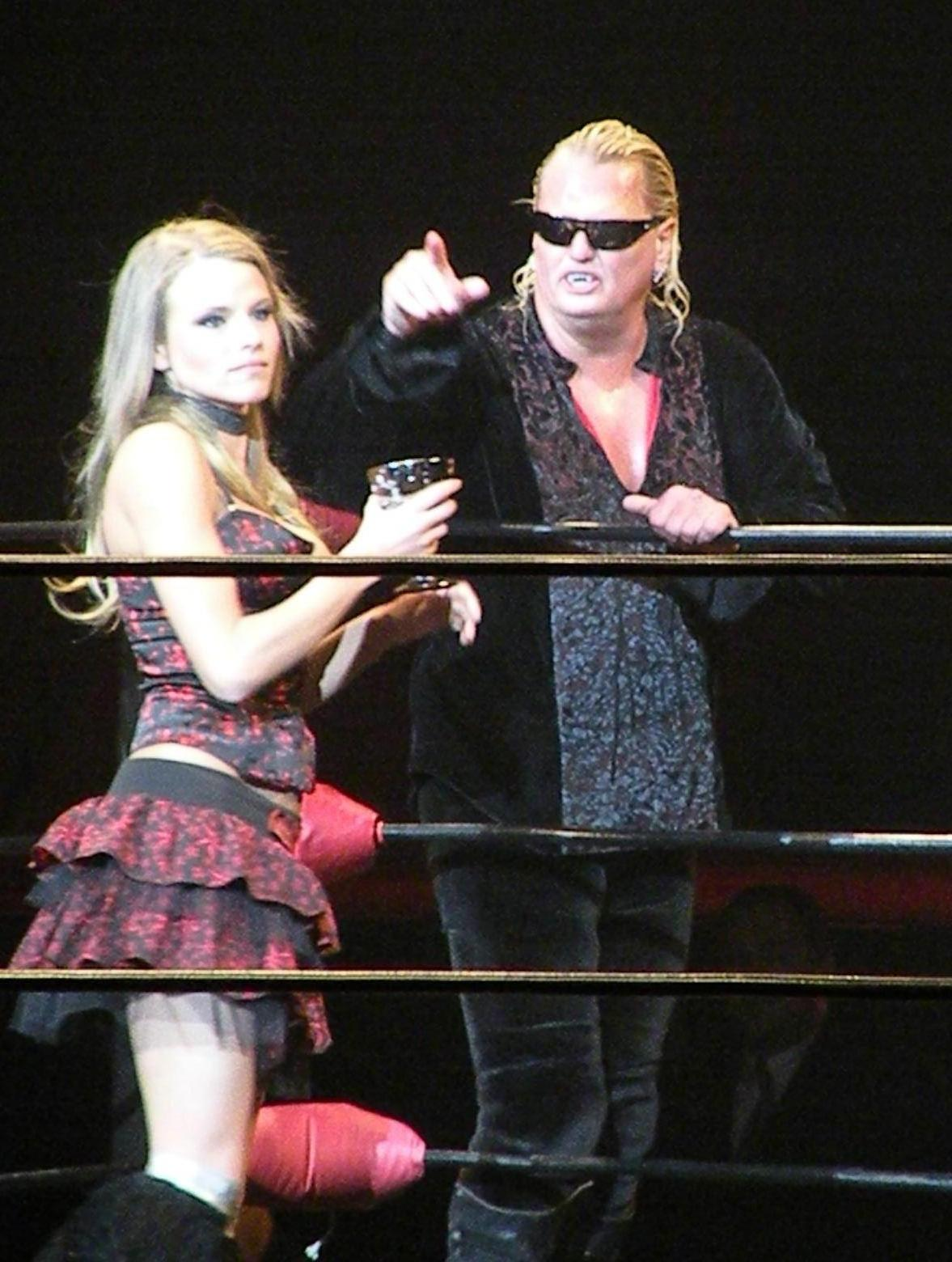 catcheur gangrel a american wrestling rampage 2009 paris